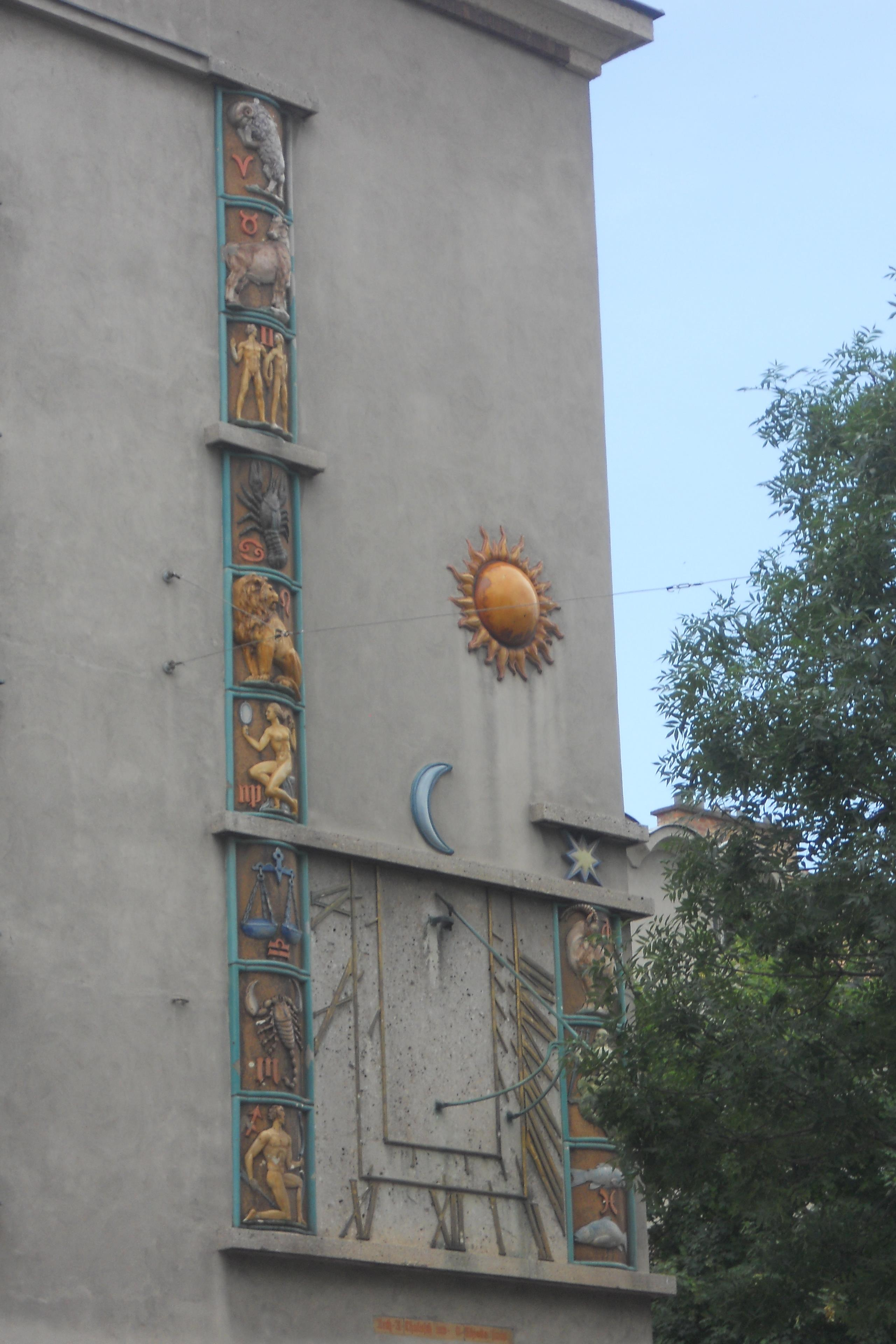 Sonnenuhr am Goethehof. Der Entwurf zu dieser Arbeit stammt vom Architekten Alfred Chalusch, für die künstlerische Umsetzung zeichnete der bekannte Bildhauer Oskar Thiede verantwortlich.